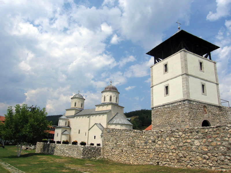 Crkva i zvonik u manastriu Mileševa